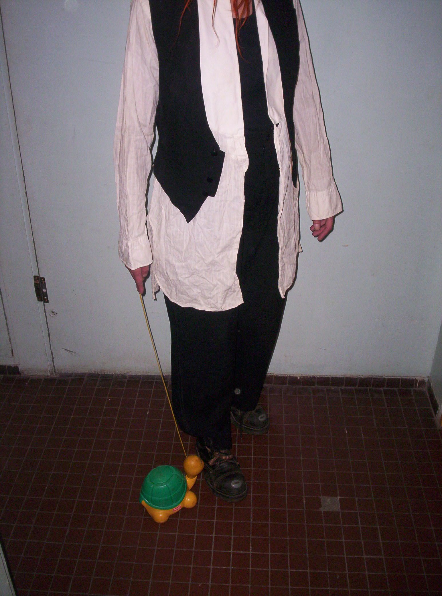 Exemple de tenue punk / sample punk's look